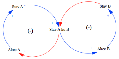 Archetyp eskalace